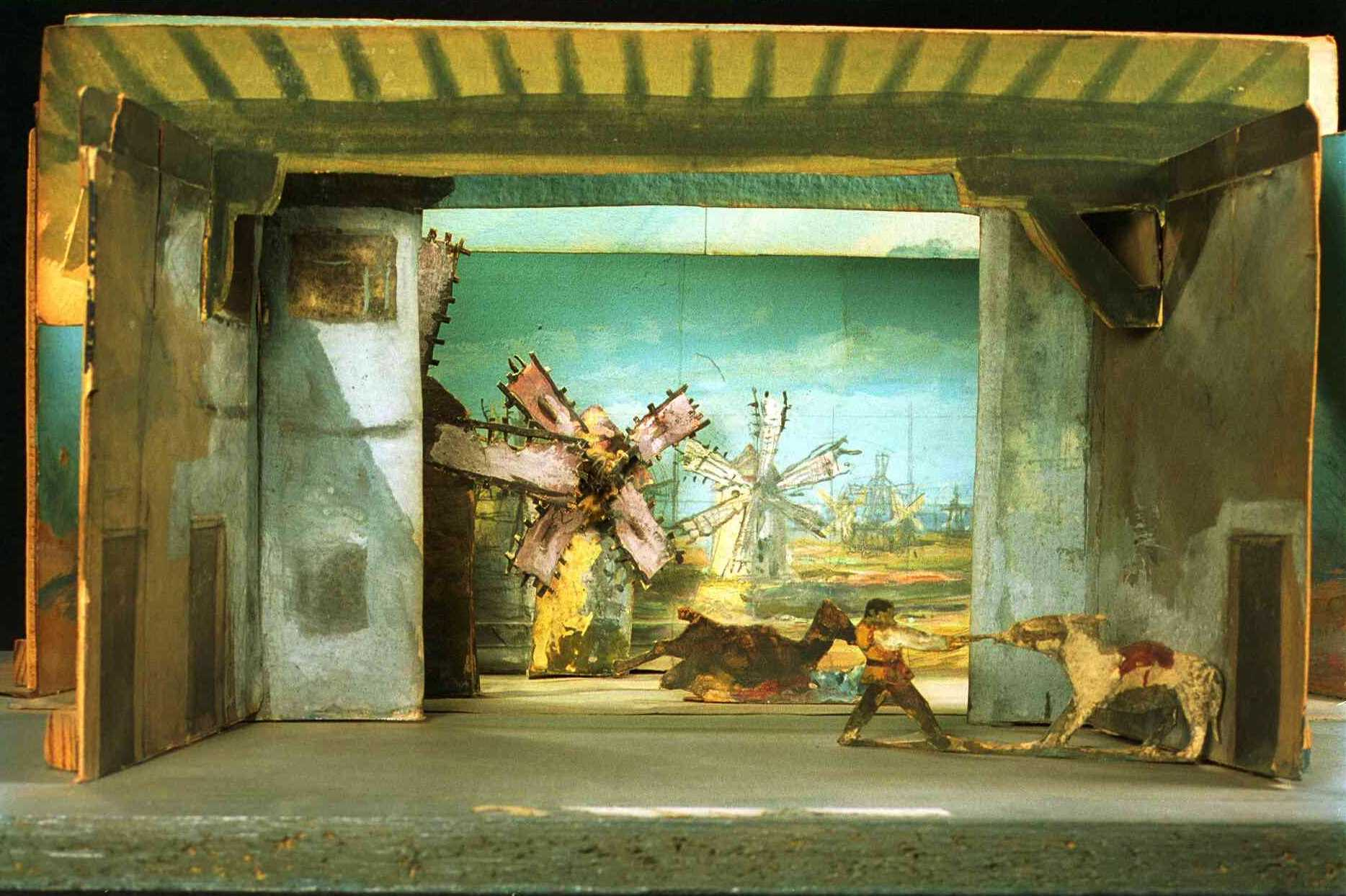 Teatrí de Fèlix Urgellès de Tovar per a la sarsuela La venta de don Quijote del músic Ruperto Chapí, per a una representació a Barcelona, ca 1905